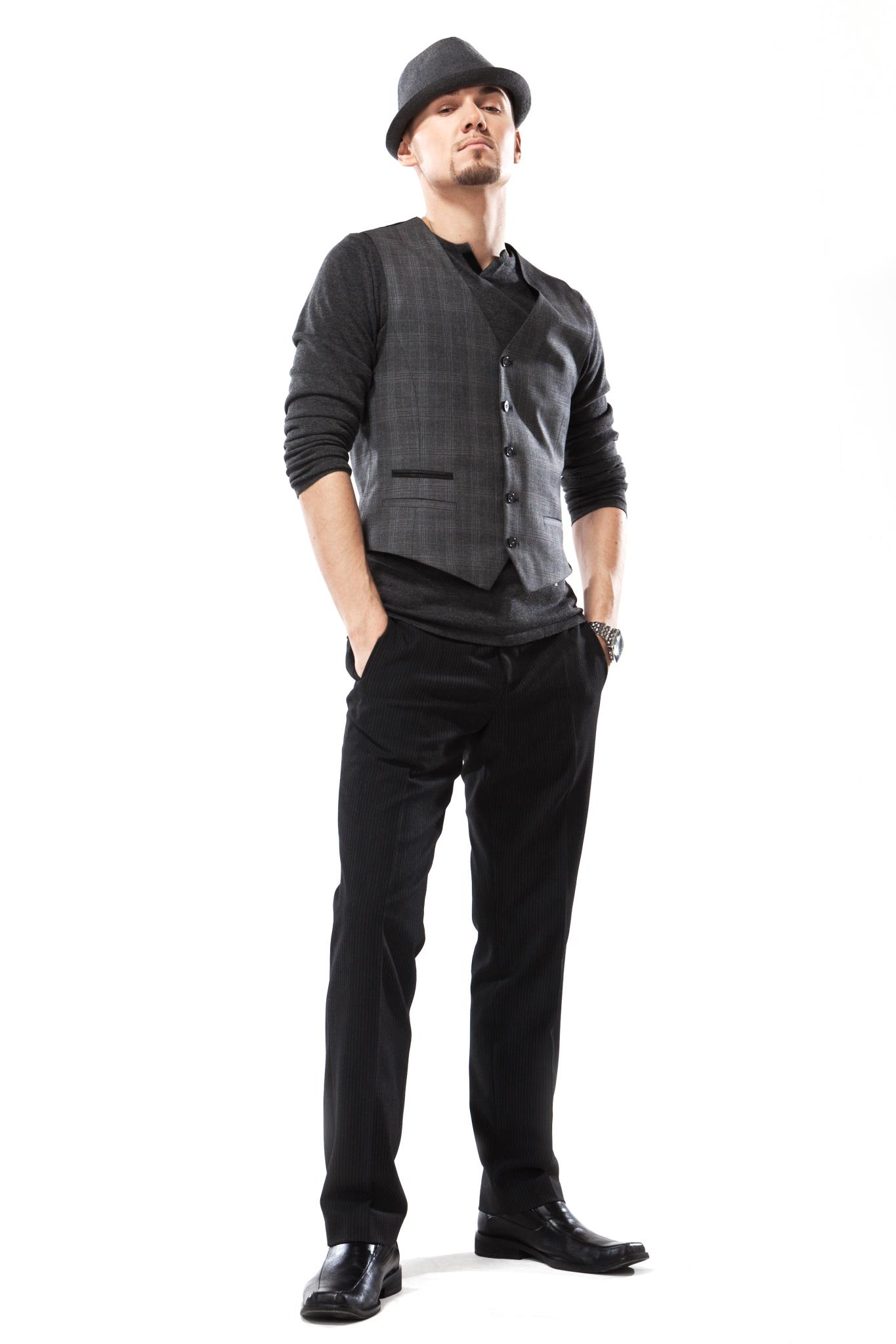 Lauri Pihlap, 2012